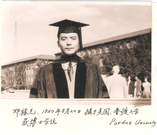 鄧稼先在普渡大學得到博士學位時的照片